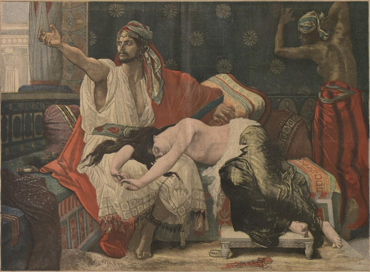 Thamar ou Thamar et Absalon